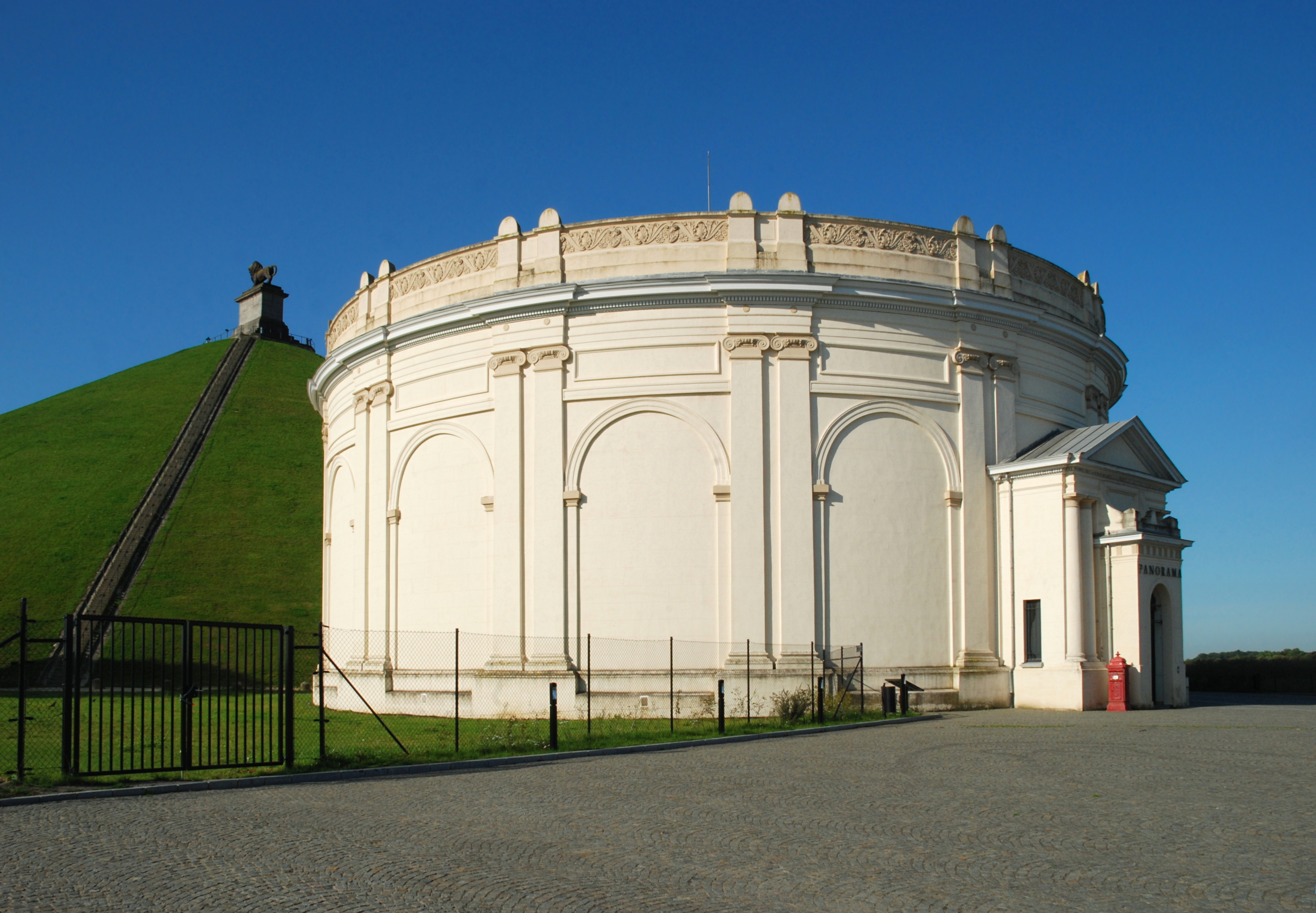 Belgique - Brabant wallon - Braine-l'Alleud - Panorama de la bataille de Waterloo (style néo-classique)